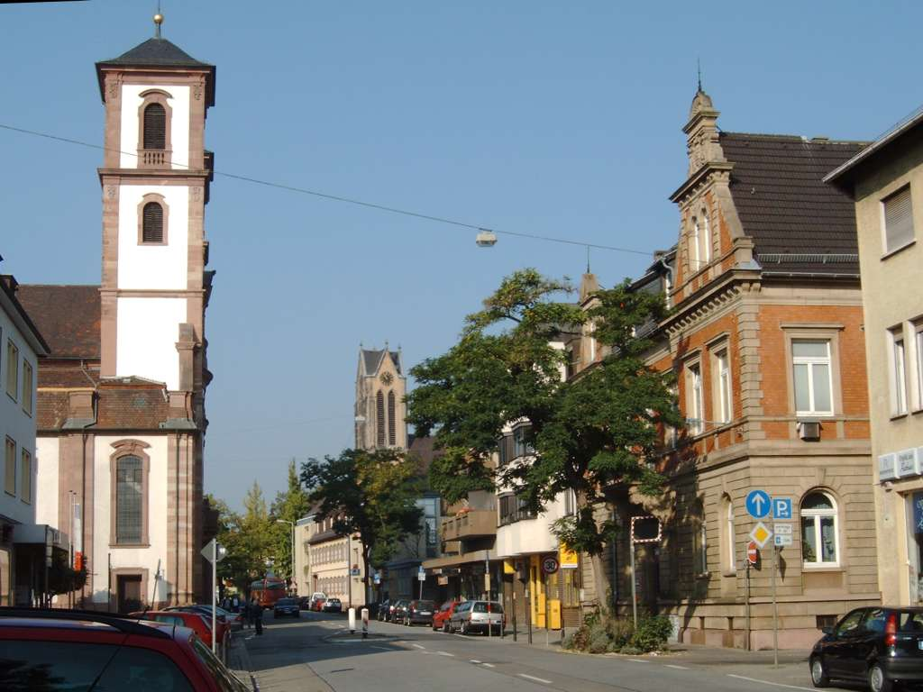 Mannheim-Neckarau Rheingoldstr